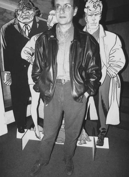 Giancarlo Alessandri, autore di fumetti. Foto di Joe Zattere (Fumetti d'Italia)